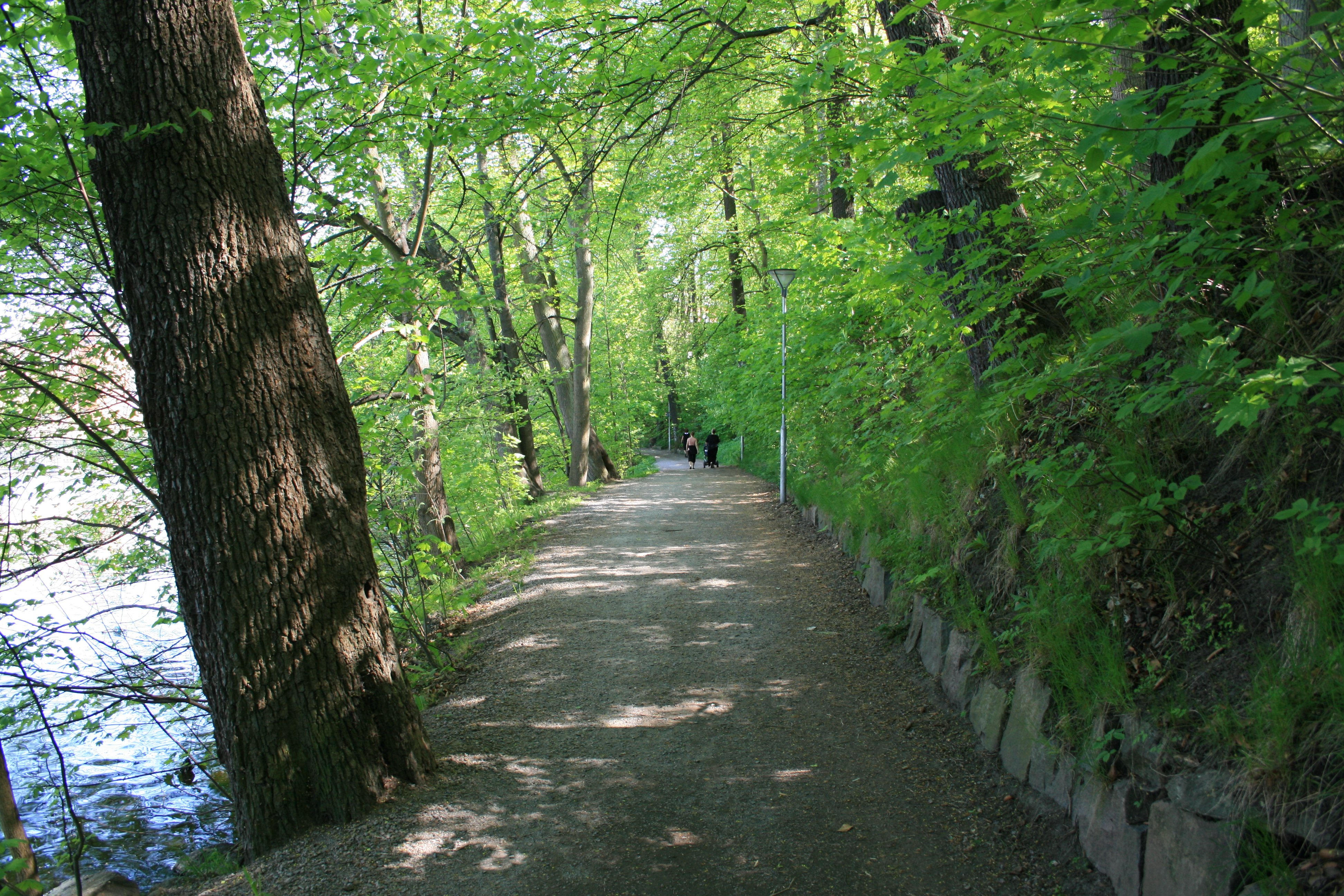 Åbackarna, södra sidan